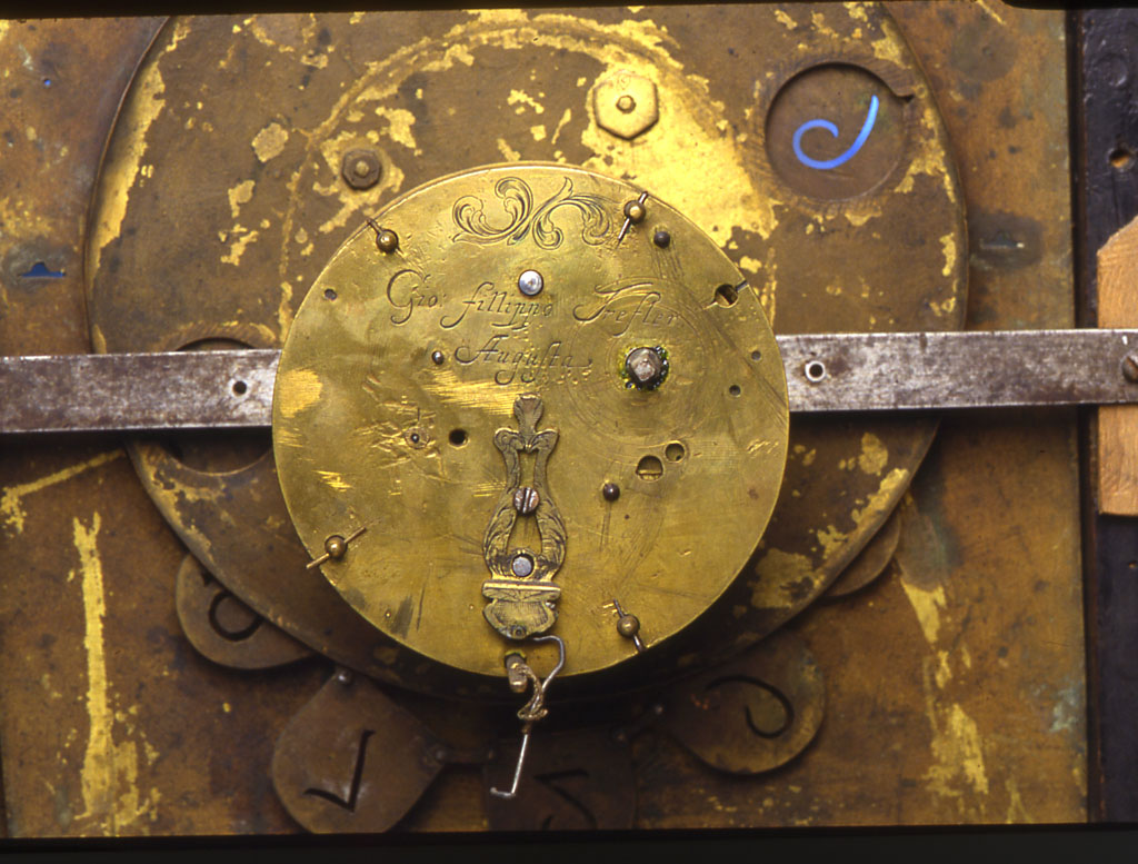 Cassa in legno nero con fregi in ottone e cornici dorate, ai lati due colonne a torciglione con capitelli in bronzo. Quadrante in metallo dipinto con al centro scena che rappresenta Atlante che regge la sfera celeste. Disco delle ore in ottone dipinto, con ore traforate in cifre arabe a cartigli con catenella. Semicerchio dei minuti con i quarti traforati in cifre latine. Movimento in ottone a platine circolari con colonne tornite. Conoide a budello, scappamento a verga regolato da pendolo con forchetta. Modalità d'uso Tipologia di orologia inventata dai fratelli Campani per esaudire il desiderio di papa Alessandro VII che desiderava leggere l'ora nell'oscurità della notte. I cartellini delle ore, intagliati e disposti su una catenella, scorrono dietro ad un finestrella del quadrante. La finestrella è illuminata da una piccola candela, posta all'interno della cassa, in modo da visualizzare le ore. Un foro nella parte superiore della cassa permette la fuoriuscita del fumo.